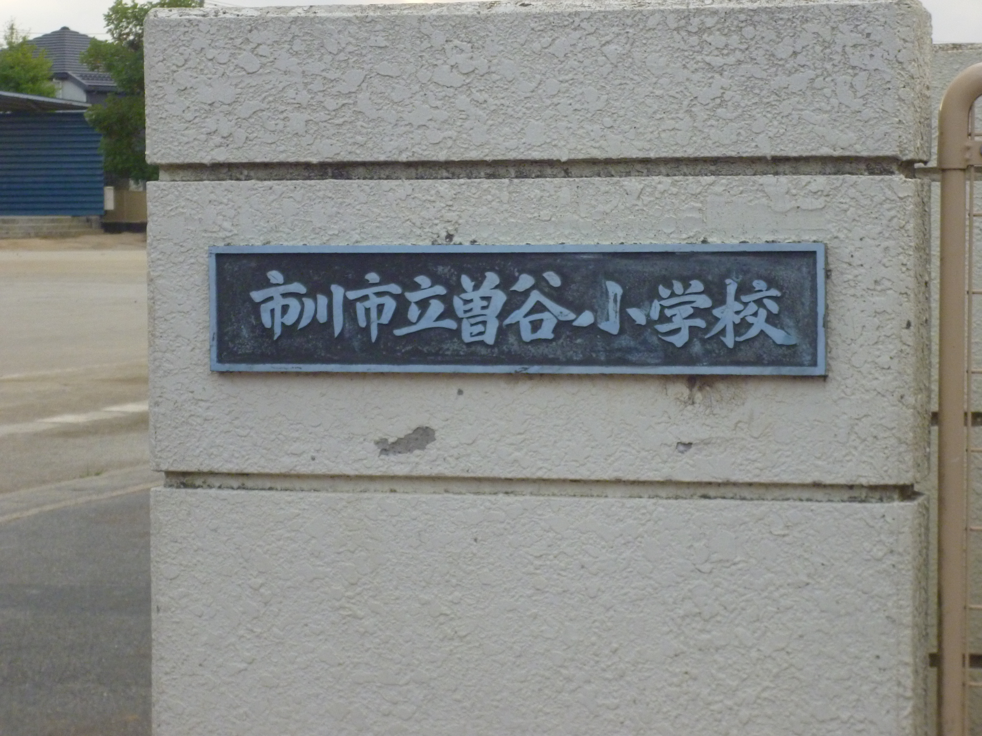 市川市立曽谷小学校の校門